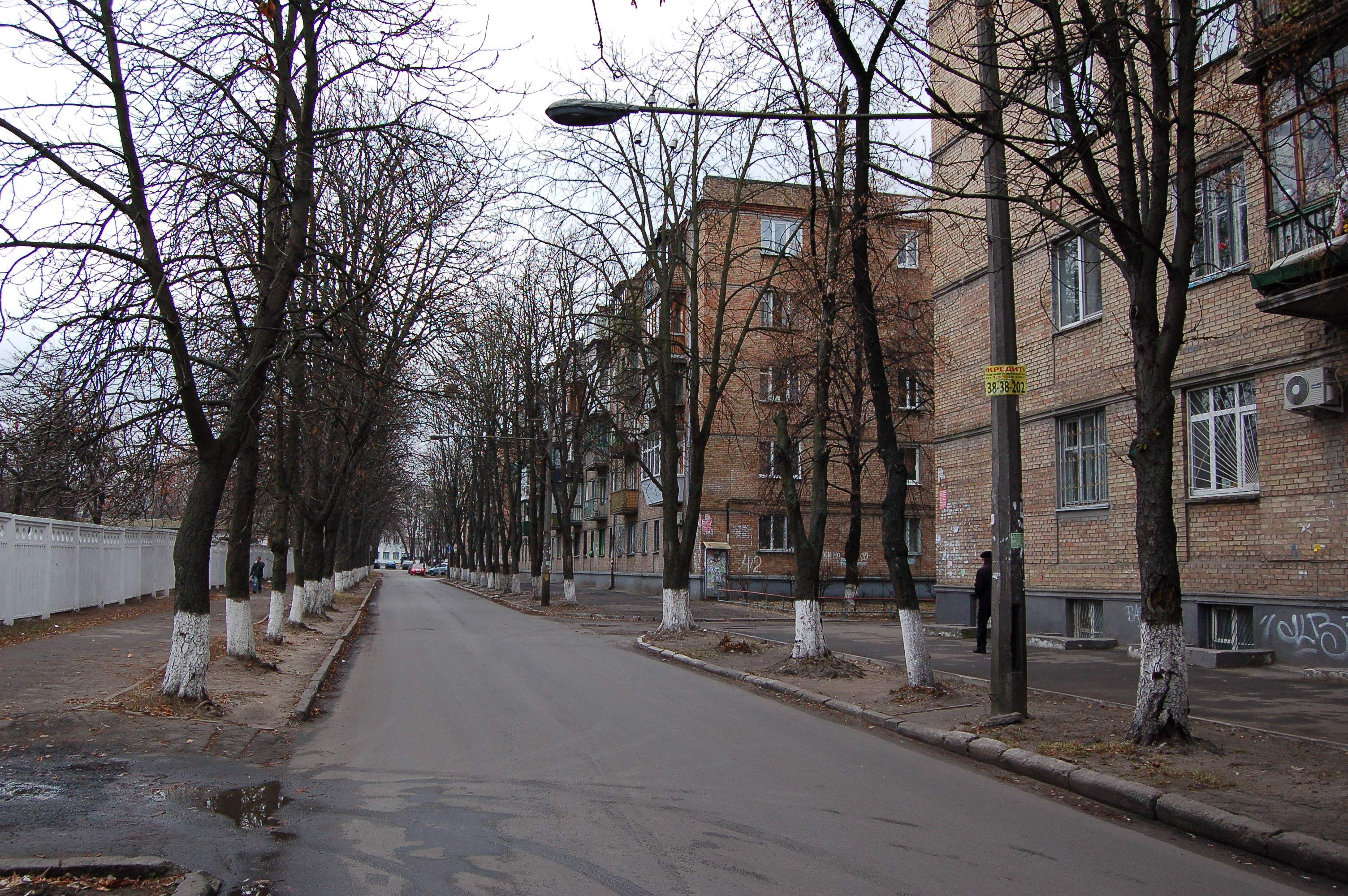 Вулиця Ґалаґанівська у Києві